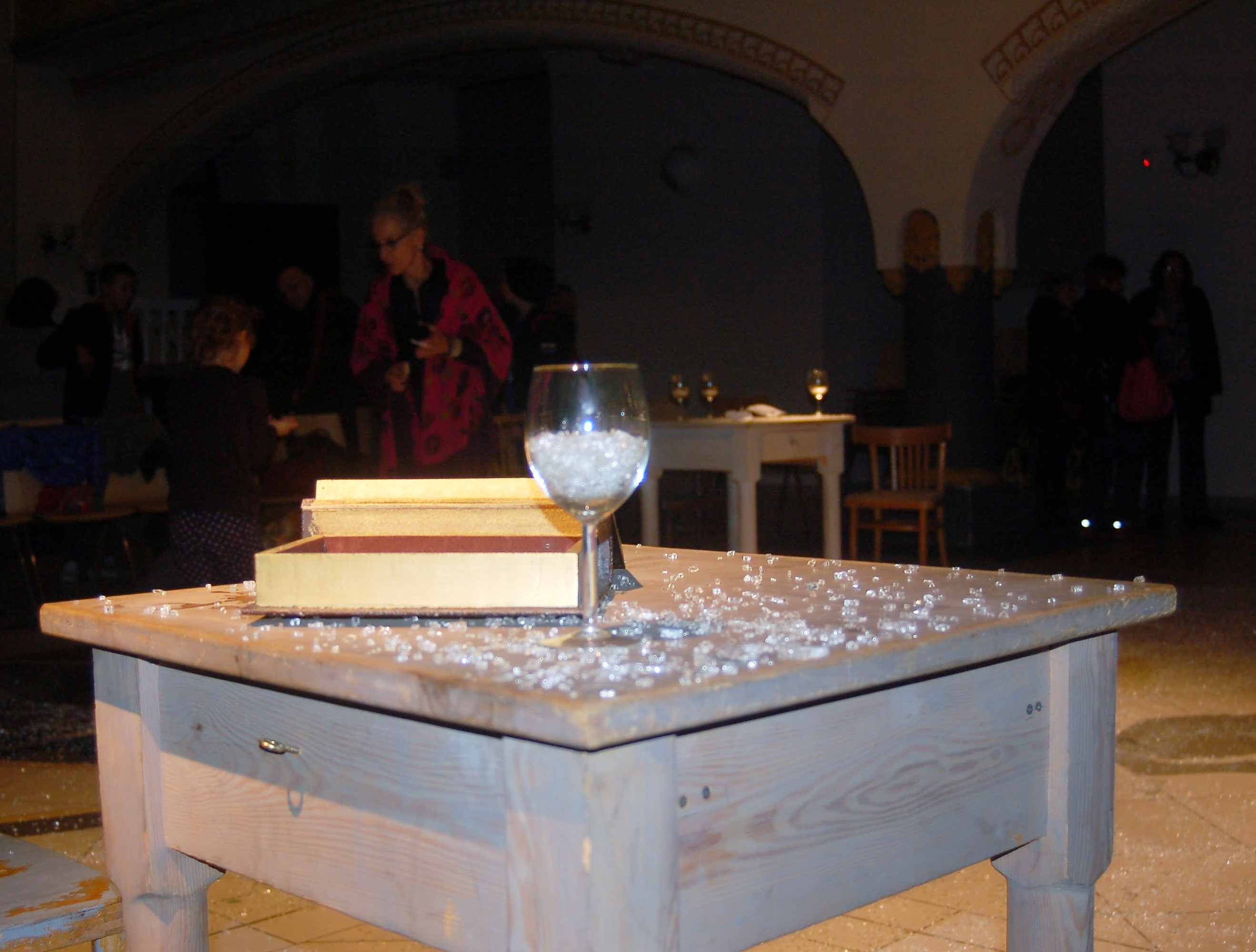 צולם על ידי בעז פכלר במסגרת 'מסע שורשים' לאירועי ליל הבדולח 2016 בברסלאו